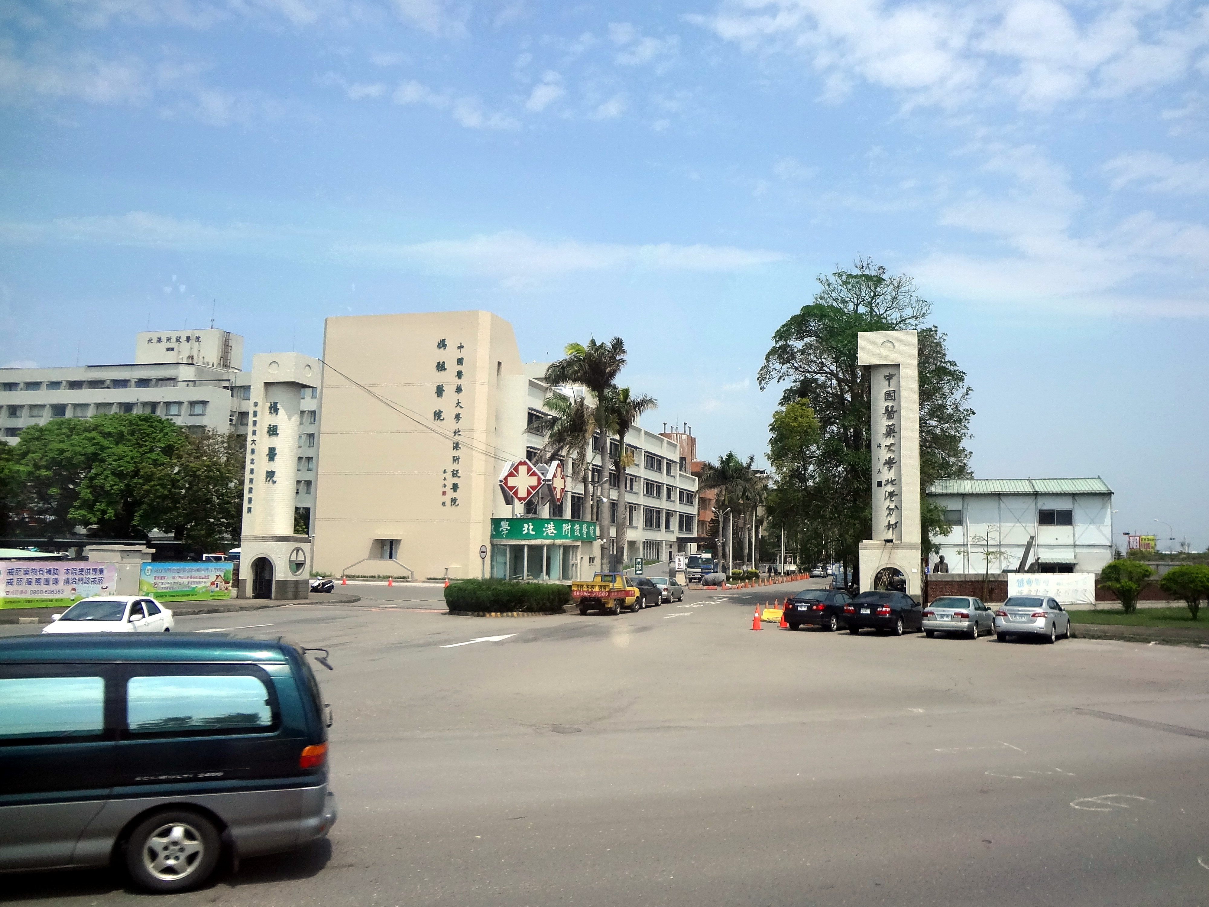 於遊覽車上拍攝中國醫藥大學北港附設醫院。